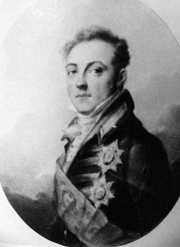 А.К.Разумовский н.х. начало XIX века